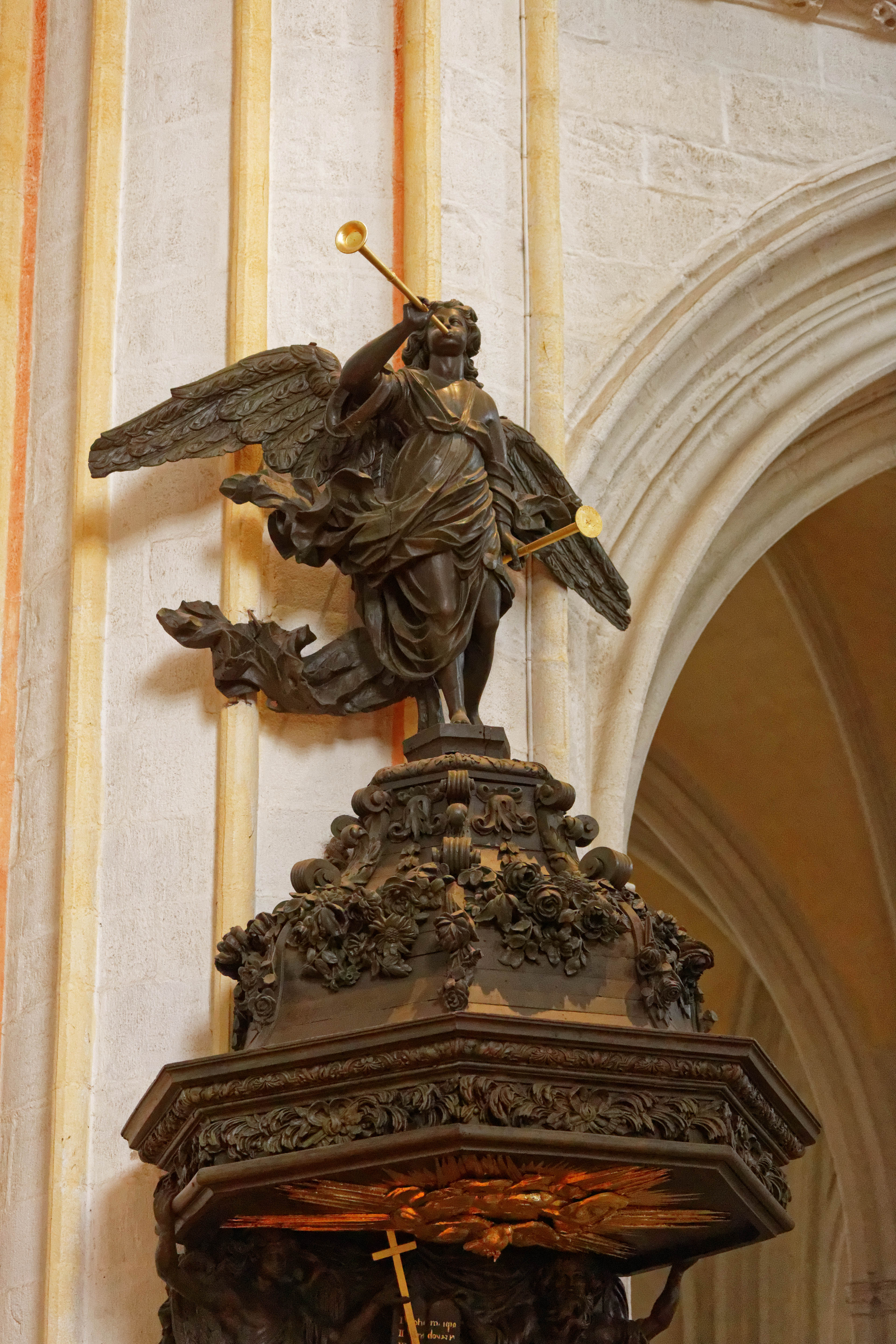 Vue intérieure de la cathédrale Saint-Corentin de Quimper.